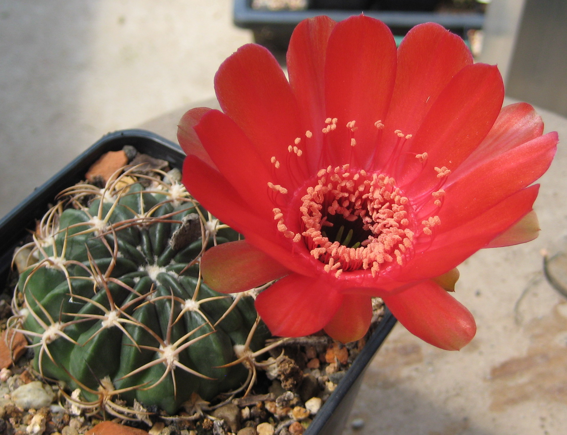 Lobivia calorubra VZ275 F1